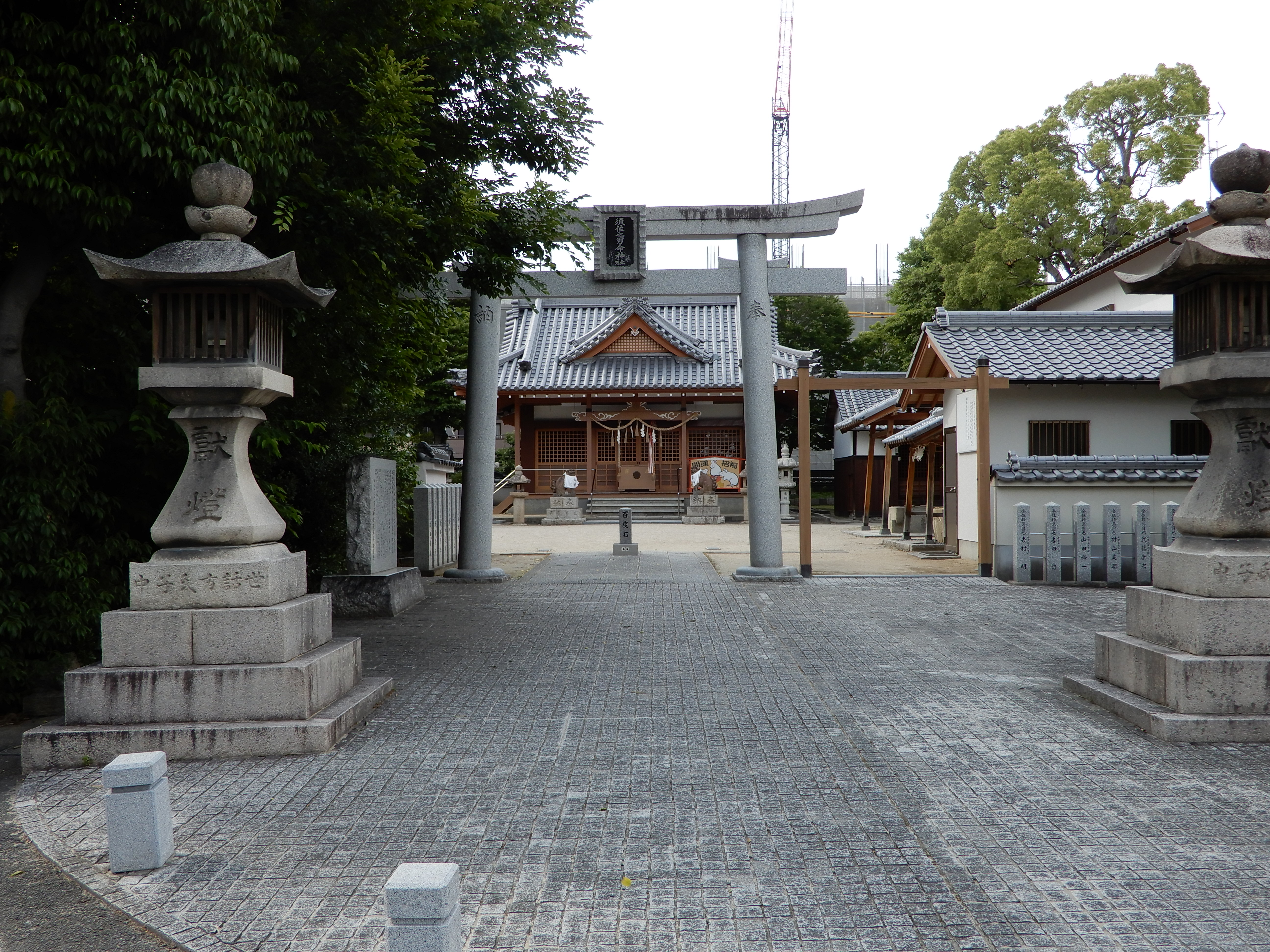 須佐之男神社（摂津市）